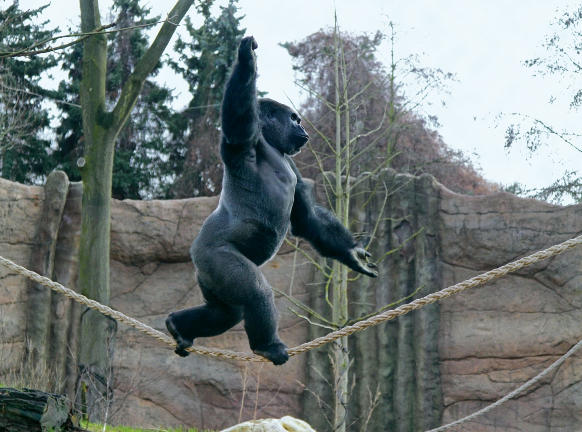 Silberrücken Kidogo bei seinem weltberühmten Seiltanz im Zoo Krefeld